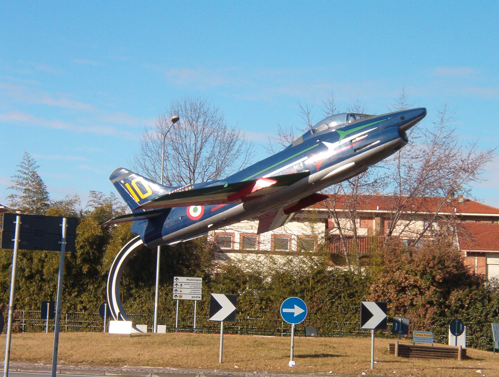 Modello di aereo a Caselle Torinese - Provincia di Torino - Italy